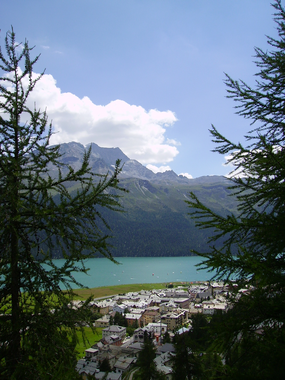 Silvaplana, Graubünden, Panorama Self taken photoshot